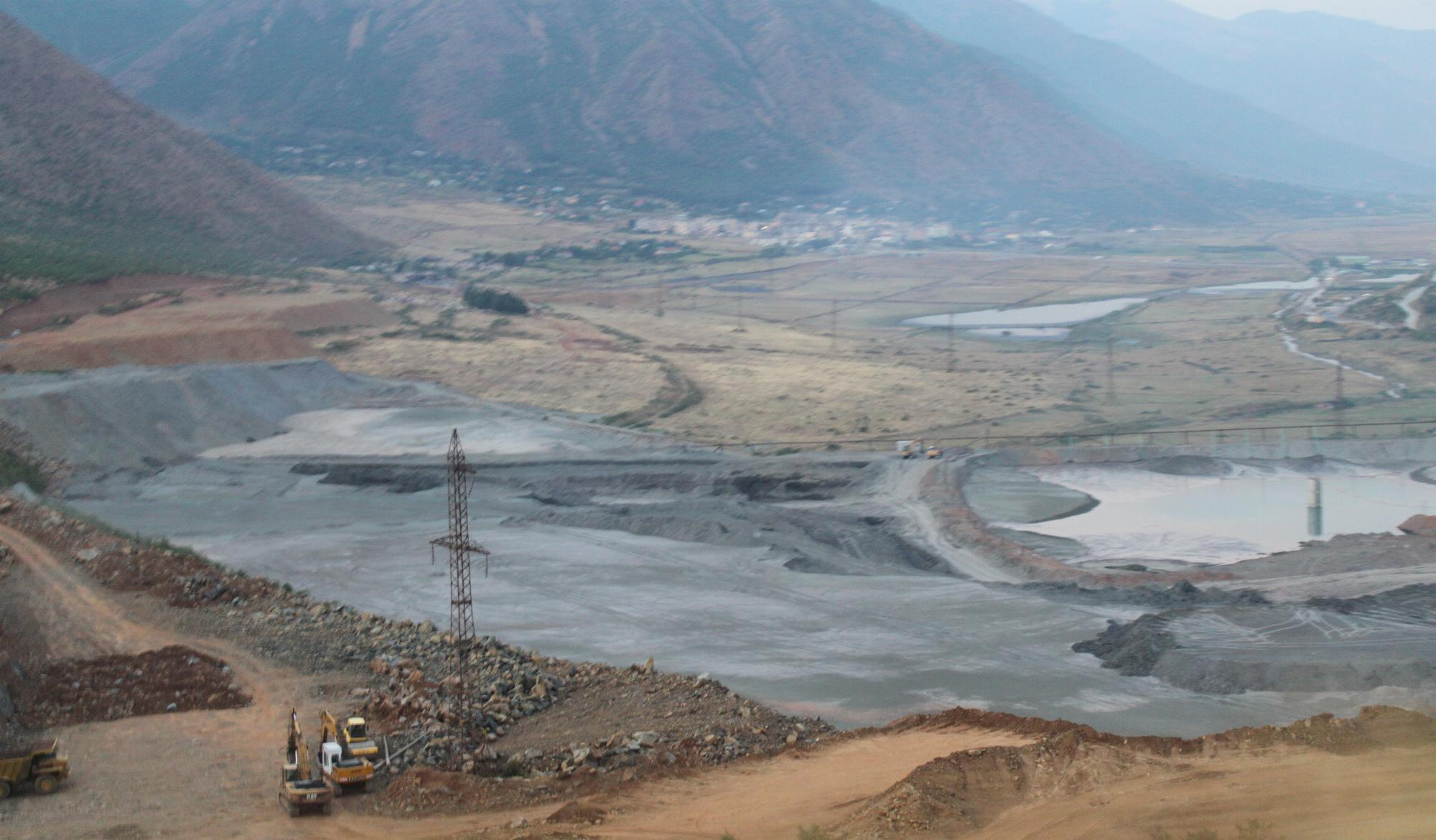 Absetzbecken der chromhaltige Schlämme, insbesondere aus der betriebseigenen Abwasserbehandlung im Bergkwerk, ca 2 km südlich von Bulqiza. Oben rechts Zufuhr der Schlämme durch Rohrleitung, unten links LKW für den Bergversatz.